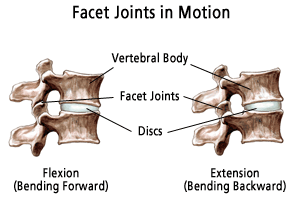 Фасеточные суставы. Фасетки (синонимы: дугоотросчатые, суставные отростки) отходят от позвоночной пластинки и участвуют в формировании фасеточных суставов. Источник